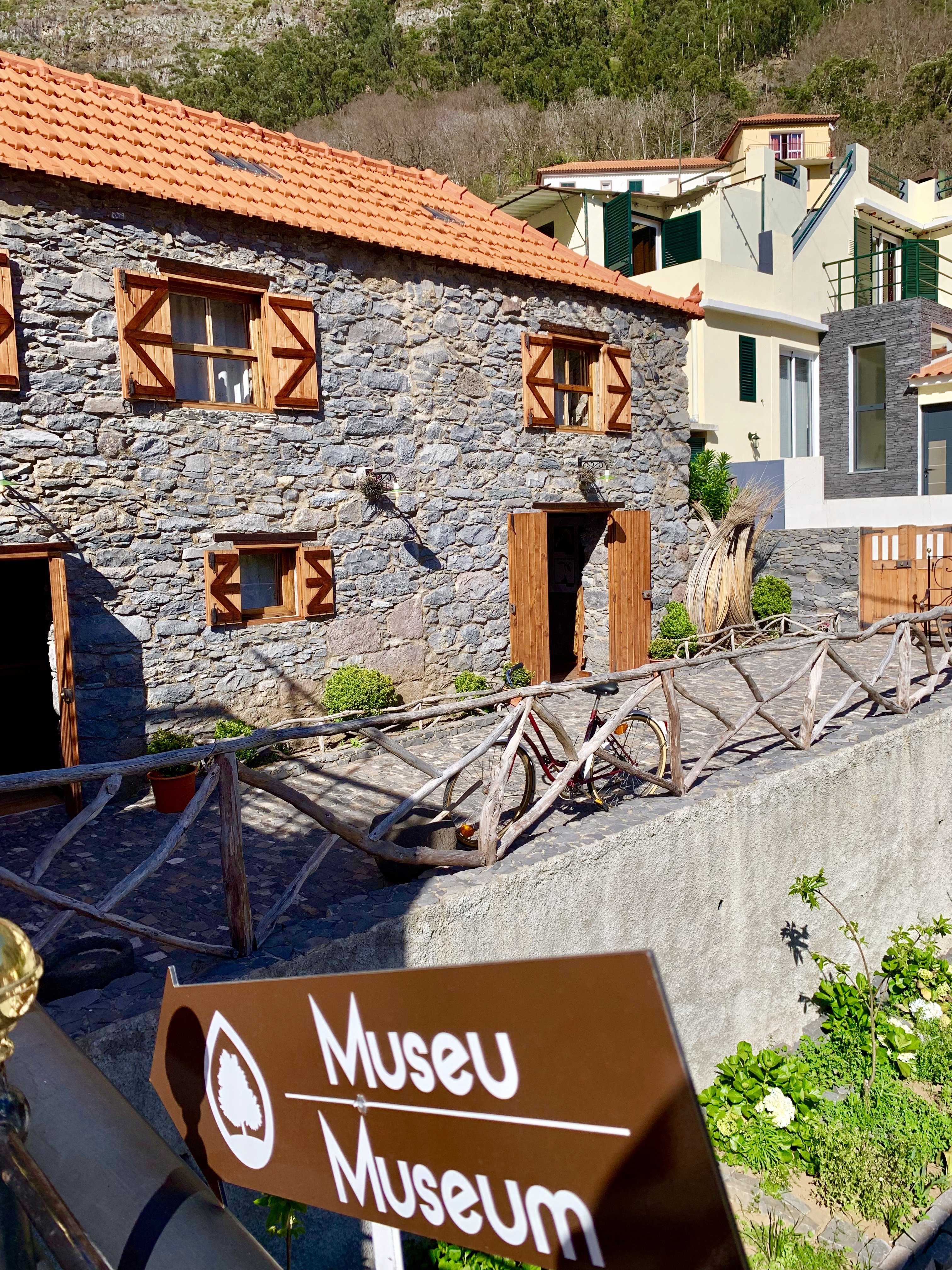 Museu da Castanha localizado no Curral das Freiras